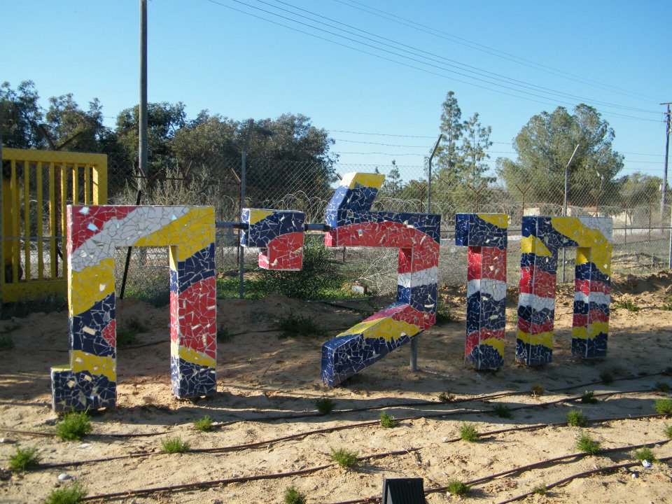 פסל בכניסה לקיבוץ